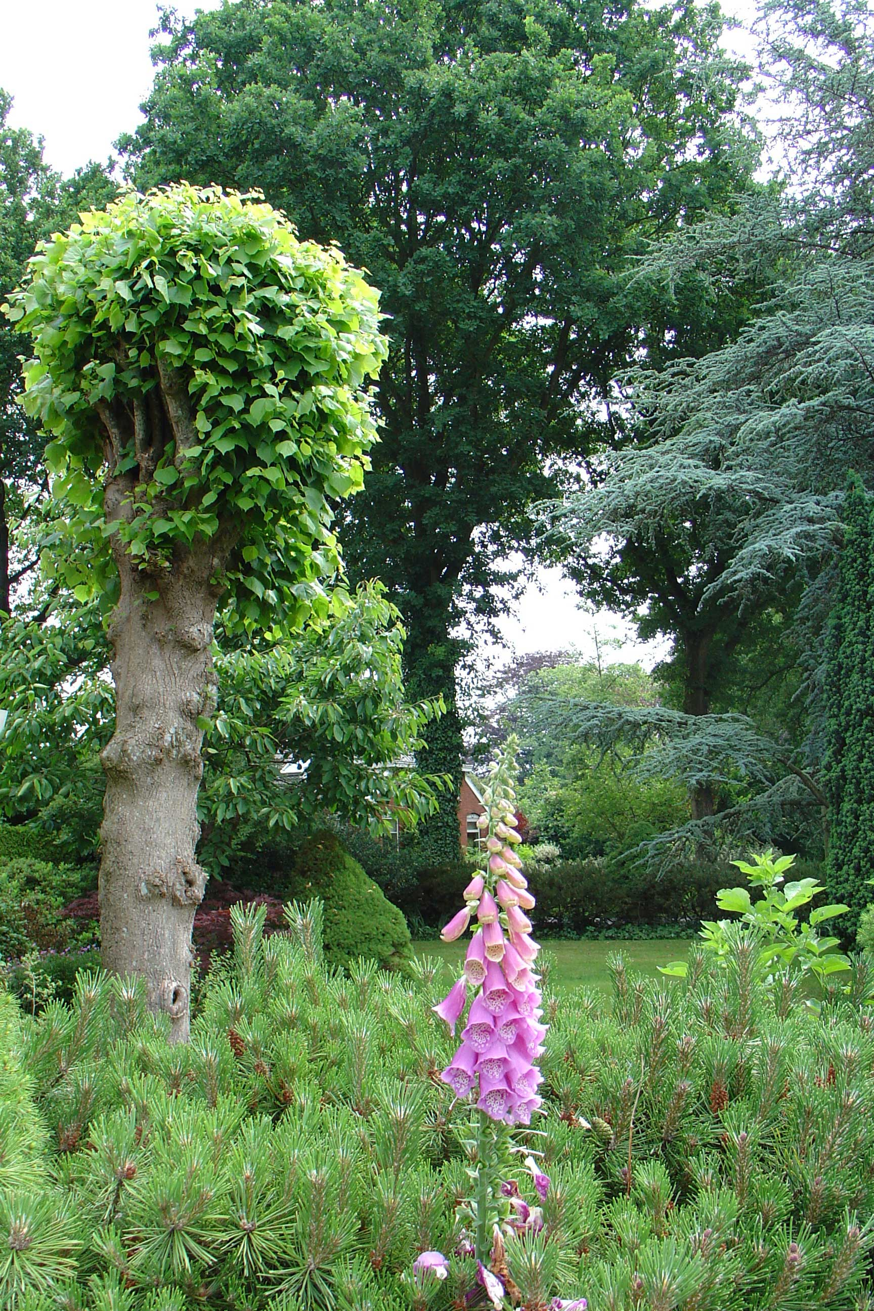 Eén van de twee breukenbomen (linden) aan de Breukenweg te Yde